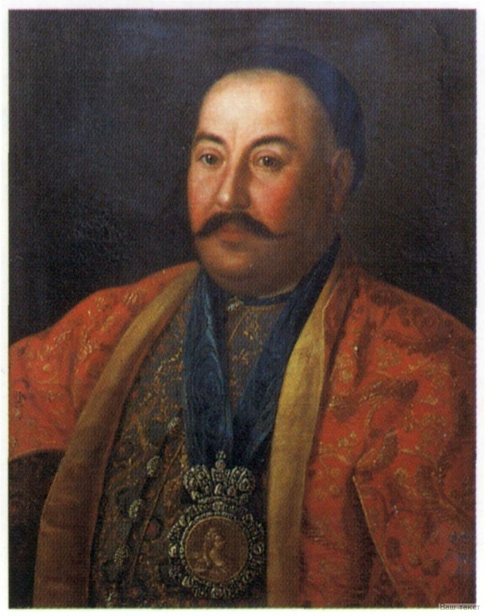 Изображен в красочном одеянии казацкого атамана, на груди — наградная медаль; по словам Я. Штелина, Антропов написал этот портрет для „гетмана" Разумовского. Еще в 1742 году атаману был презентован миниатюрный портрет императрицы Елизаветы Петровны, обрамленный алмазами. С этим портретом, слегка увеличенным и выдвинутым на первый план, его и написал Антропов, используя для декорирования яркий синий цвет ленты. Заказной портрет атамана, несомненно, писался с натуры. Художник воссоздает такие черты облика, которые можно зафиксировать только при непосредственном наблюдении: складку на лбу, морщины под глазами, гладкий двойной подбородок.